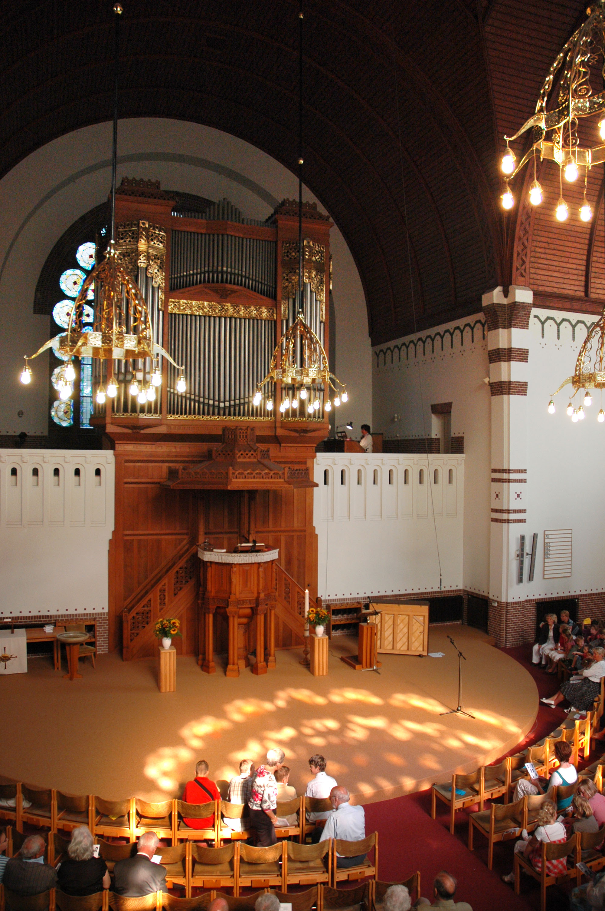 Interieur Adventskerk, Alphen aan den Rijn